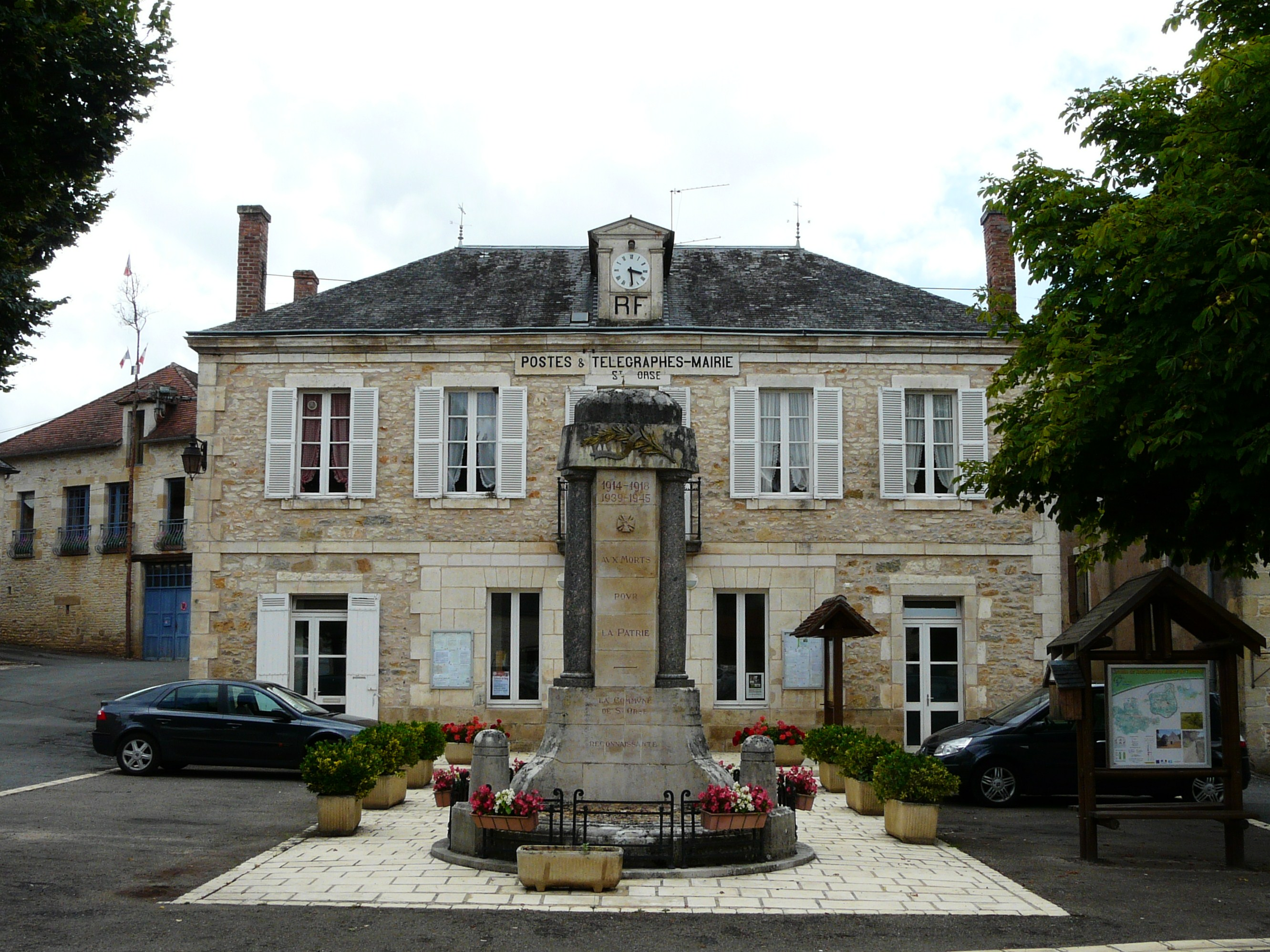 Le monument aux morts devant la mairie de Sainte-Orse, Dordogne, France